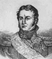 Général_Frédéric_Henri_Walther